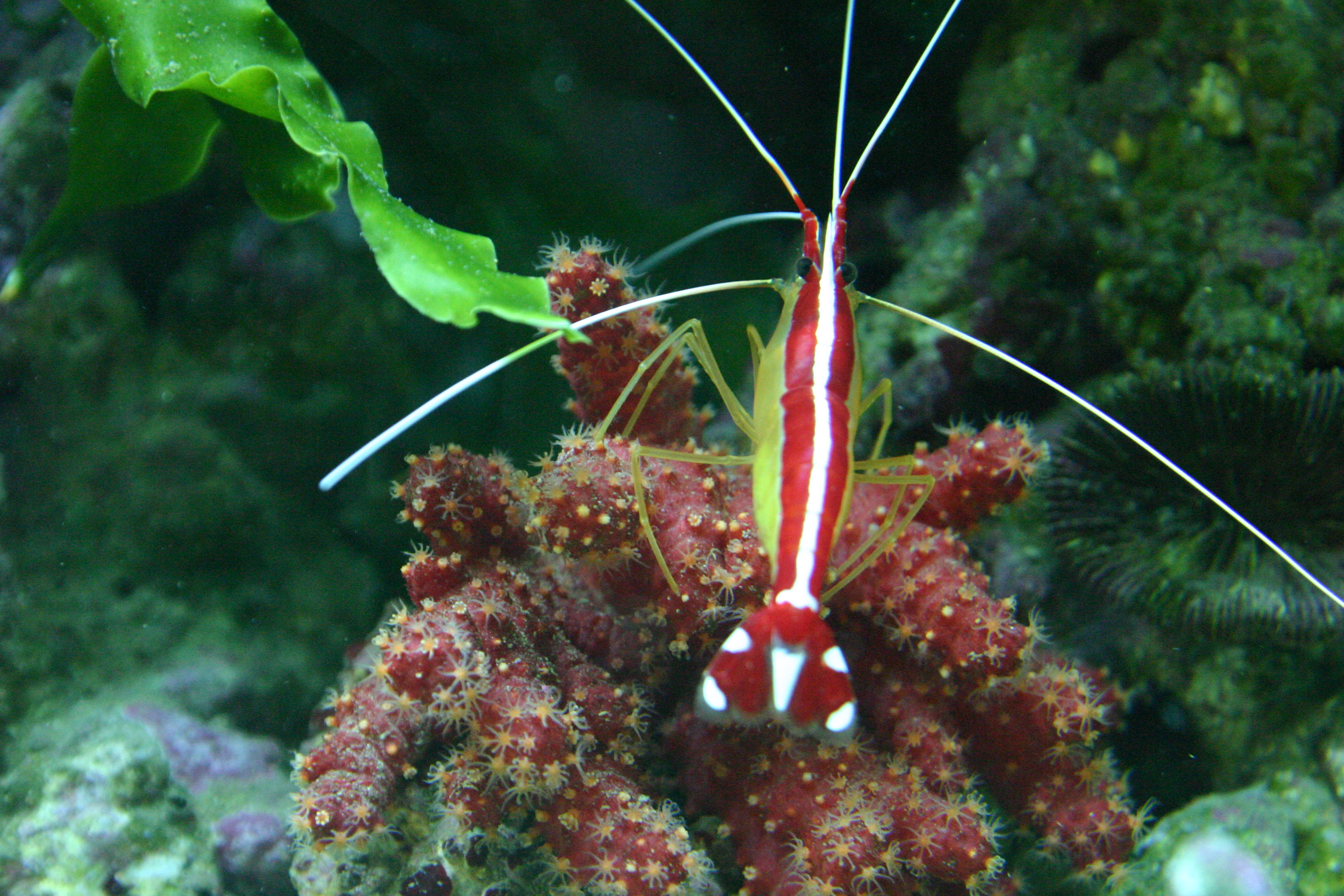 Lysmata en Nephtygorgia, en acuario de arrecife